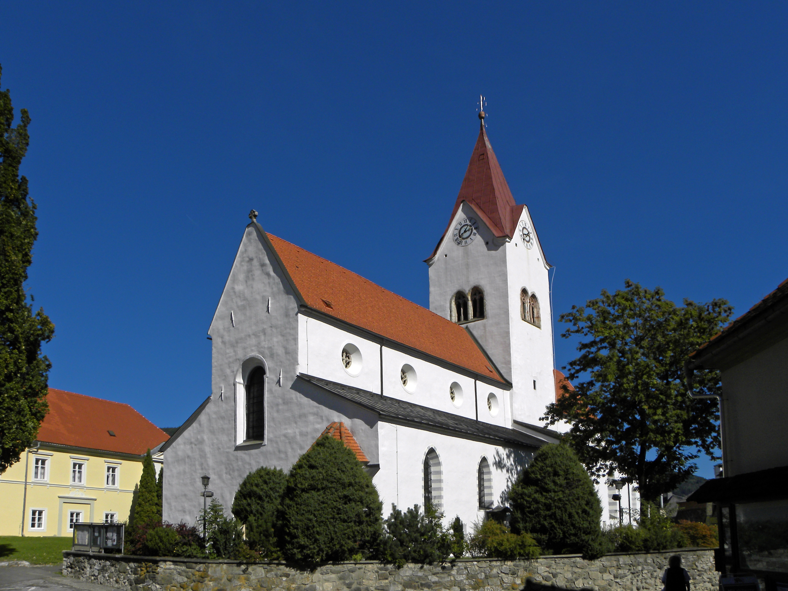 Kath. Pfarrkirche Mariä Himmelfahrt und Friedhof